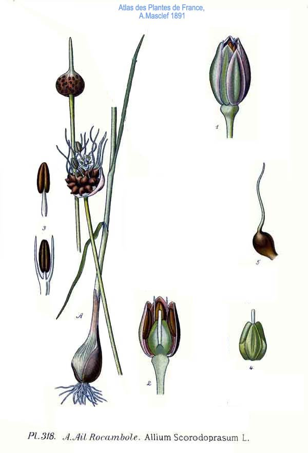 Alliums scorodoprasum L.